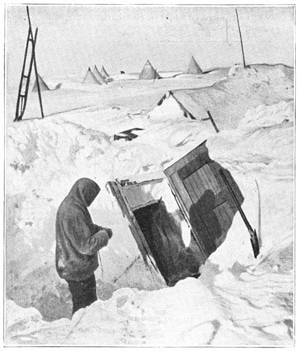 Aan de Zuidpool